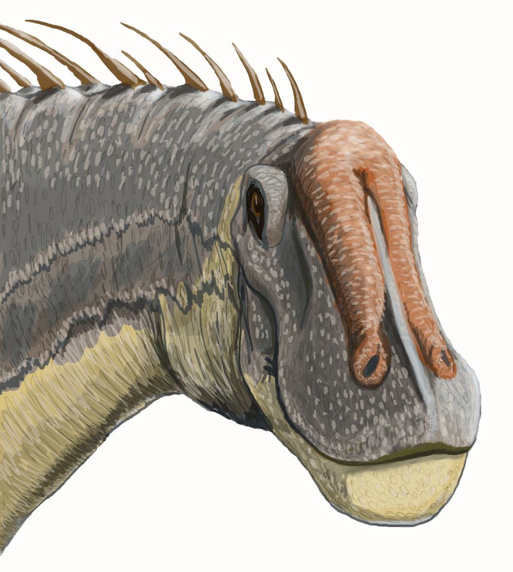 Dicreosaurus